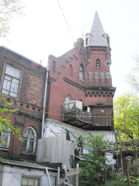 Mariupol old hospital